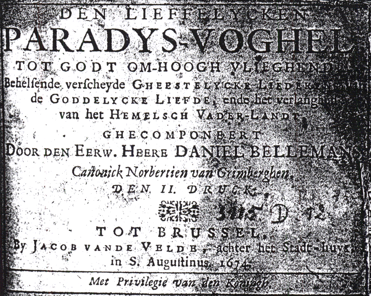 Den lieffelycken Paradys-Vogel, tot Gods om hoogh vlieghende, behelsende verscheyde gheestelycke Liedekens van de Goddelycke liefde, ende het verlanghen van het Hemelsch Vaderlandt (titre de la 6e éd.) (l'oiseau du paradis, qui élève son vol jusqu'à Dieu) ; un recueil de cantiques spirituels sur la charité et sur le désir du ciel. Il y a eu au moins douze éditions de ce recueil demeuré populaire au XVIIIe siècle ; le célèbre poète, le Jésuite Adriaan Poirters, contribua à ce recueil par une louange introductive ; éd. en 1670, 1673, 1674, 1680, 1681, 1683, 1686, 1695, 1718, 1724 (à Anvers) et encore en 1770 chez Petrus Josephus Rymers.